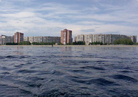 Иртыш (левый берег) вид на микрорайон Стрелка в городе Усть-Каменогорске